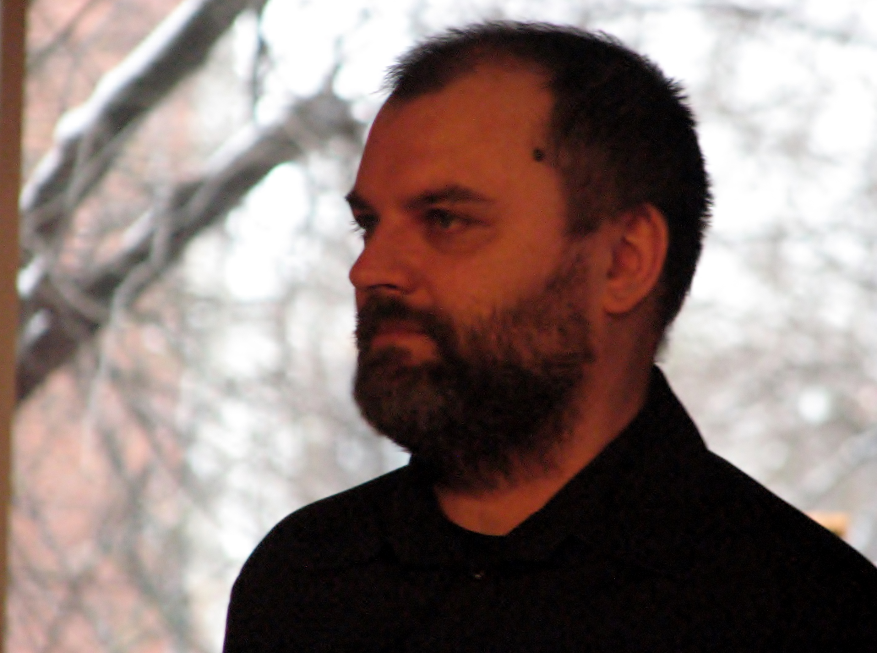 Andres Varustin Solarise keskuses Apollo lastehommikul